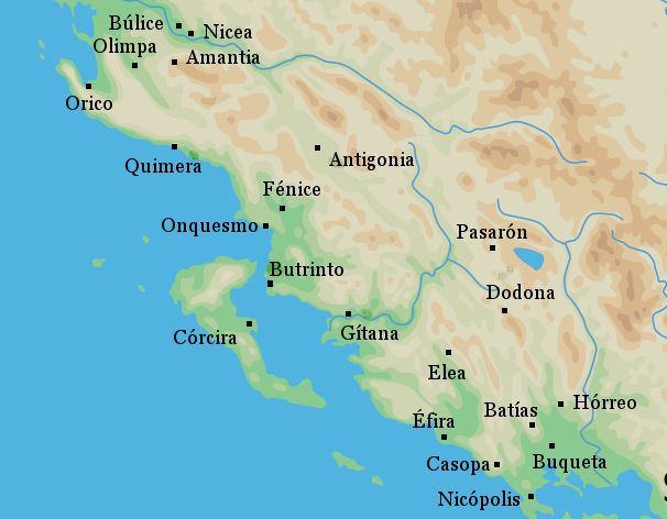 Mapa con la ubicación aproximada de algunas de las principales ciudades del antiguo Epiro.